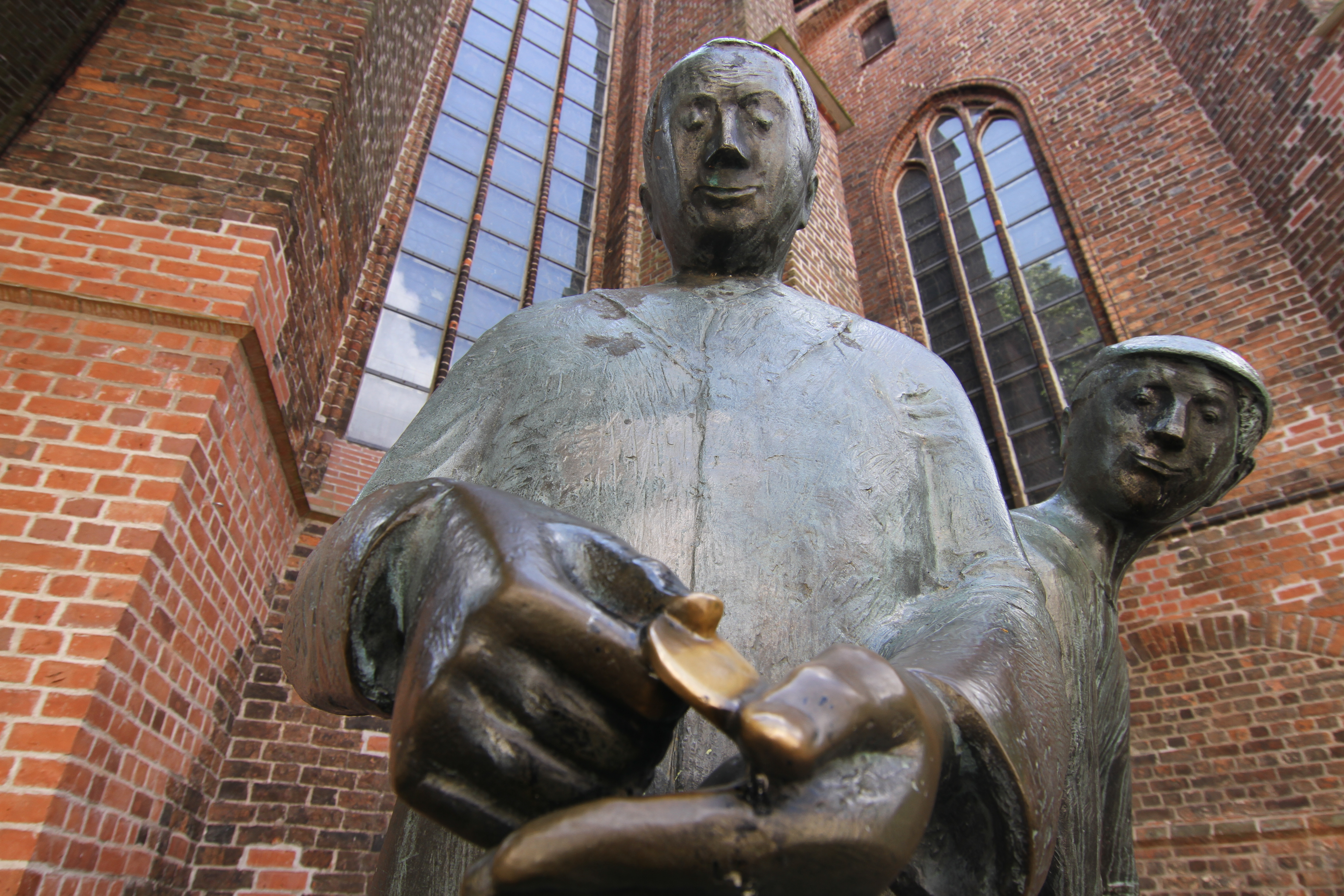 Das Uhlenköperdenkmal in Uelzen